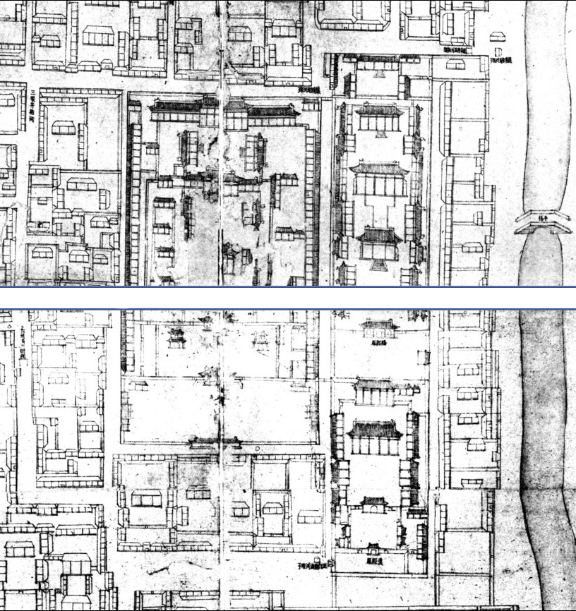 乾隆十五年（1750年）完成的《乾隆京城全图》中的嵩祝寺及番经厂、汉经厂。本图来自清內務府藏京城全圖，故宮博物院影印，民國二十九年十二月（1940年）。由于建筑的南、北部分在此次影印出版时位于不同页，所以本图为本人拼接而成，拼接时难免有差错，请自行查阅原图校对。